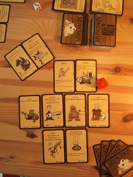 Typische Spielsituation bei Munchkin